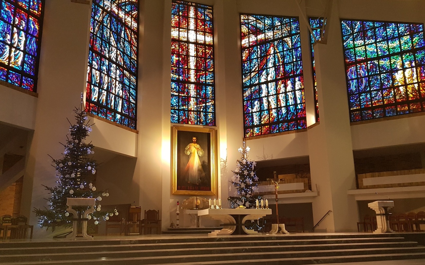 Ołtarz kościoła pw. Miłosierdzia Bożego w okresie świąt Bożego Narodzenia w 2017